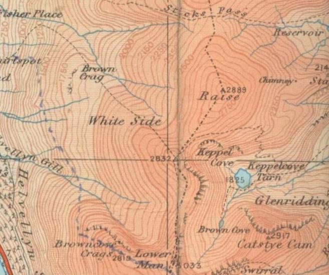 old OS map